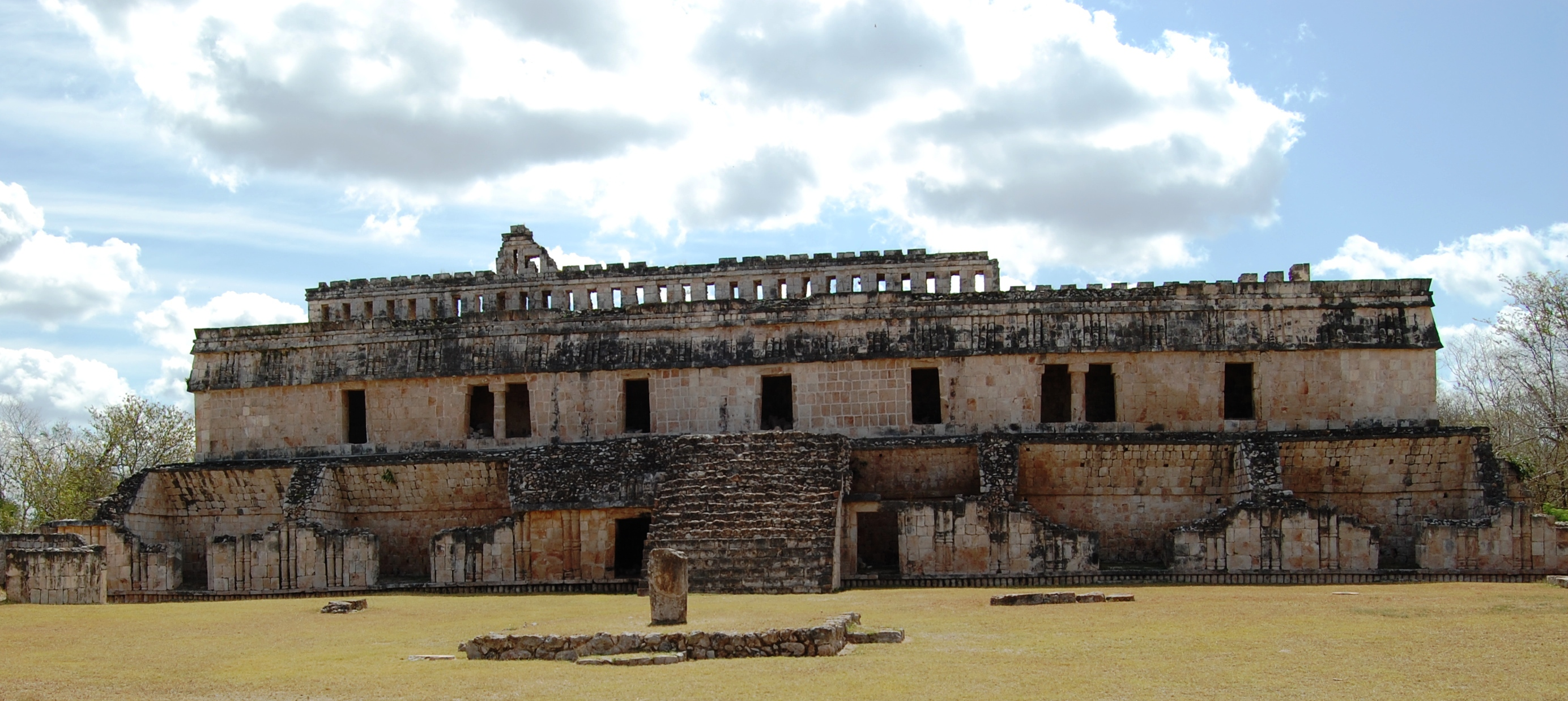 Kabah, Mexico